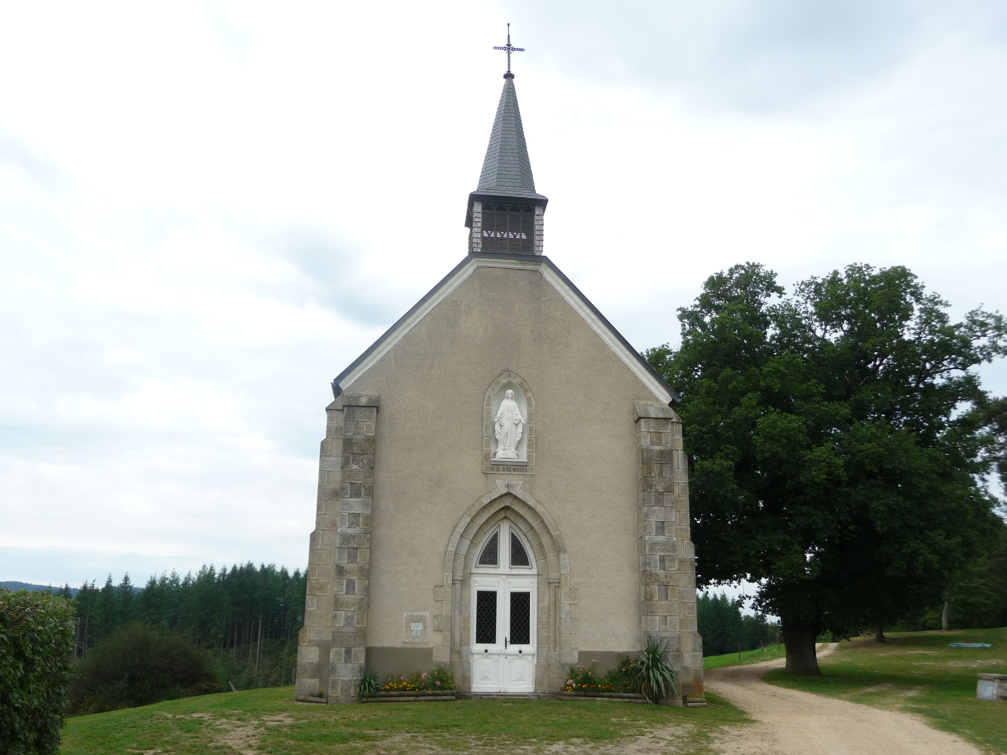 Chapelle des Peux, aux environ de Job.